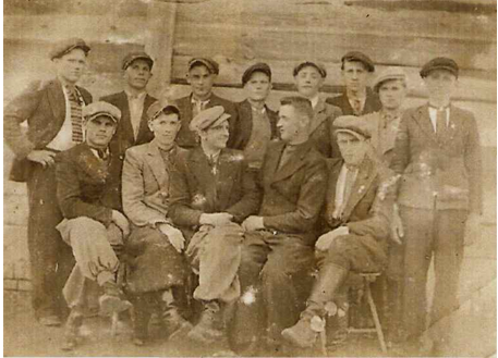 Товариство «Відродження». 1936р. 1 ряд знизу: Ковальчук Микола, Олійник Йосип, Ващук Михайло, Шмирка Петро, Ващук Омелян. 2 ряд.: Солдат Петро, Огінський Іван, Тарадаха Павло, Солдат Михайло, Балковський Василь, Дубик Олександр, Покотило Михайло, Олійник Олександр.